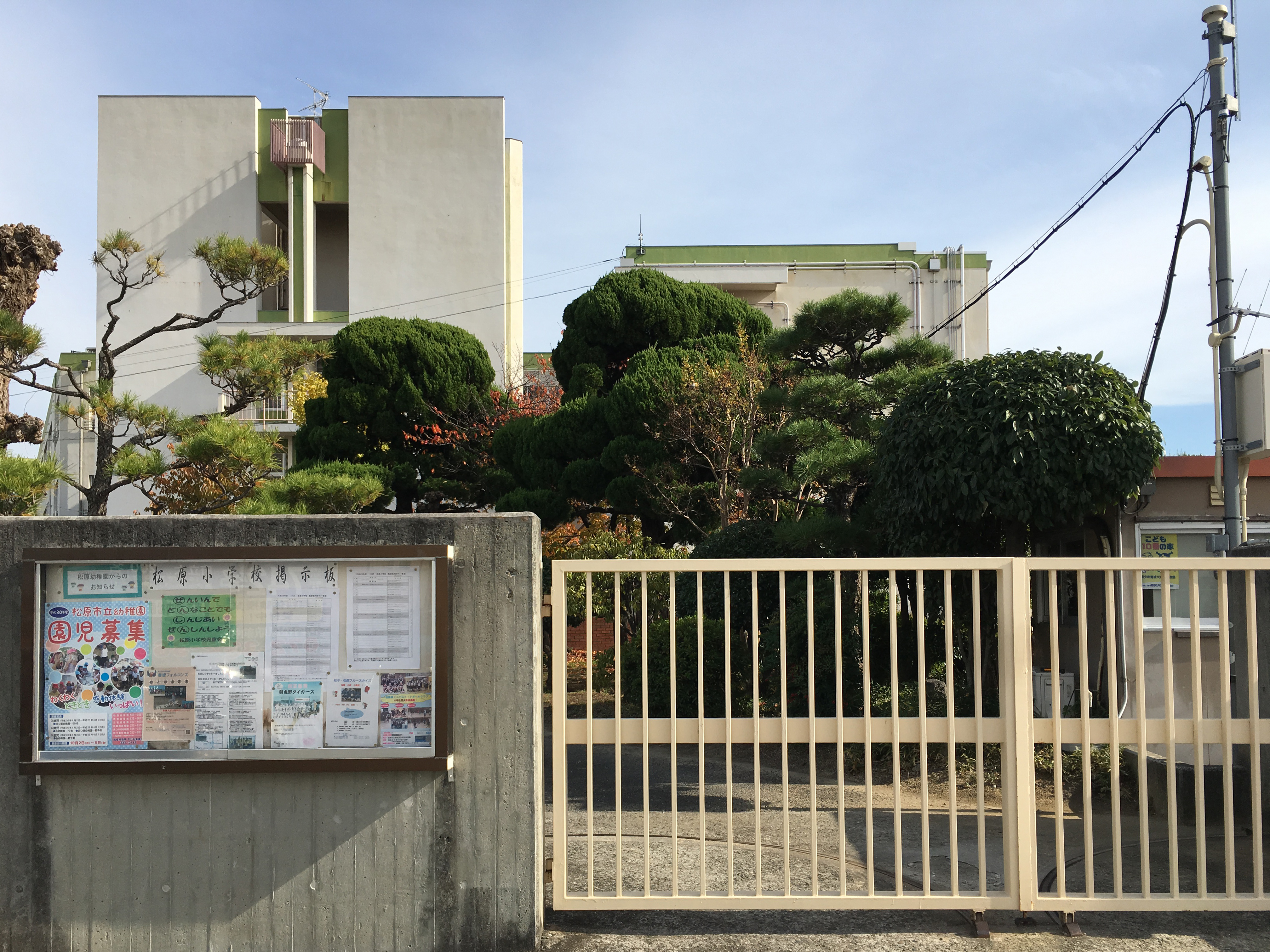 松原市立松原小学校